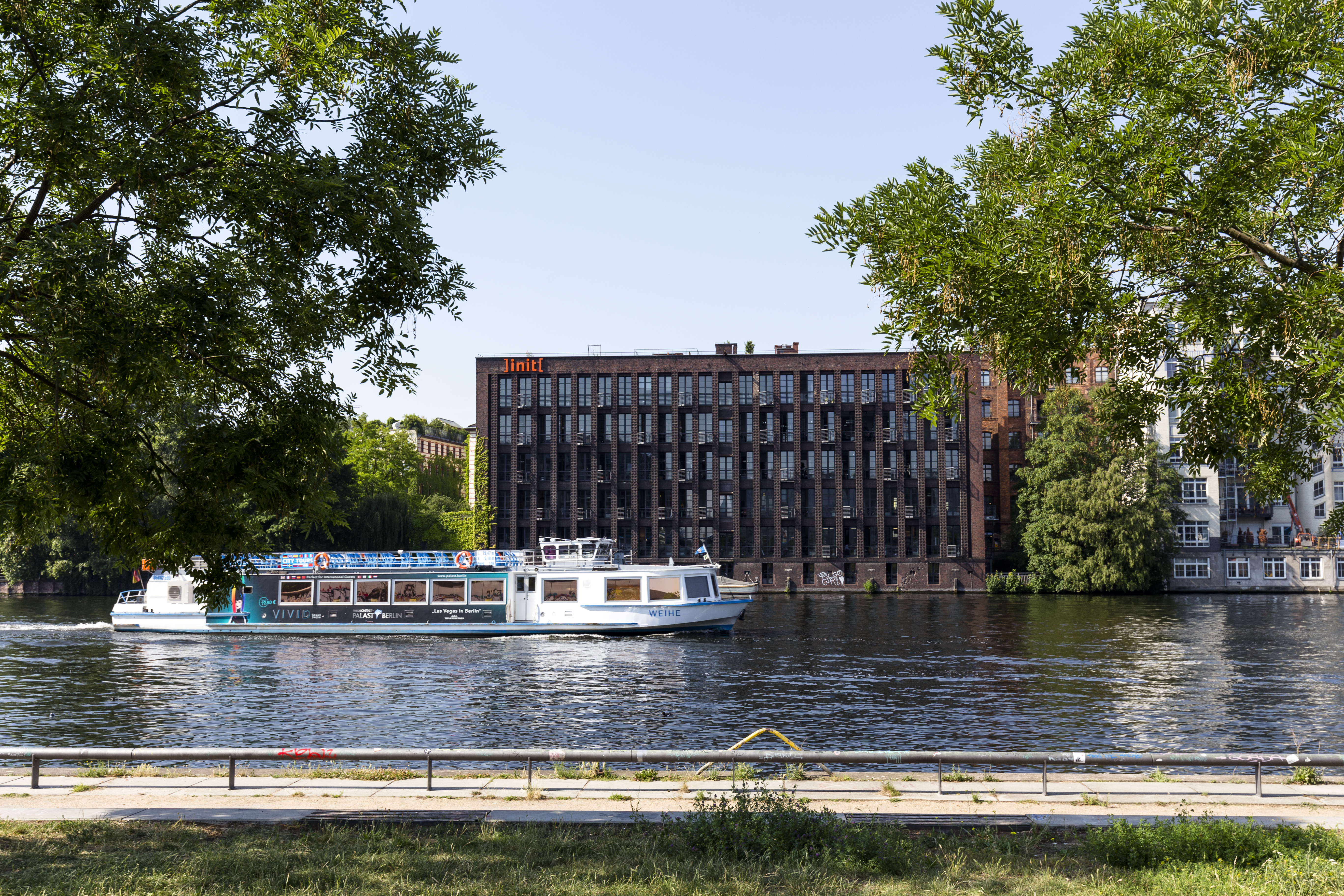 "West Side Office" der Init AG in Berlin